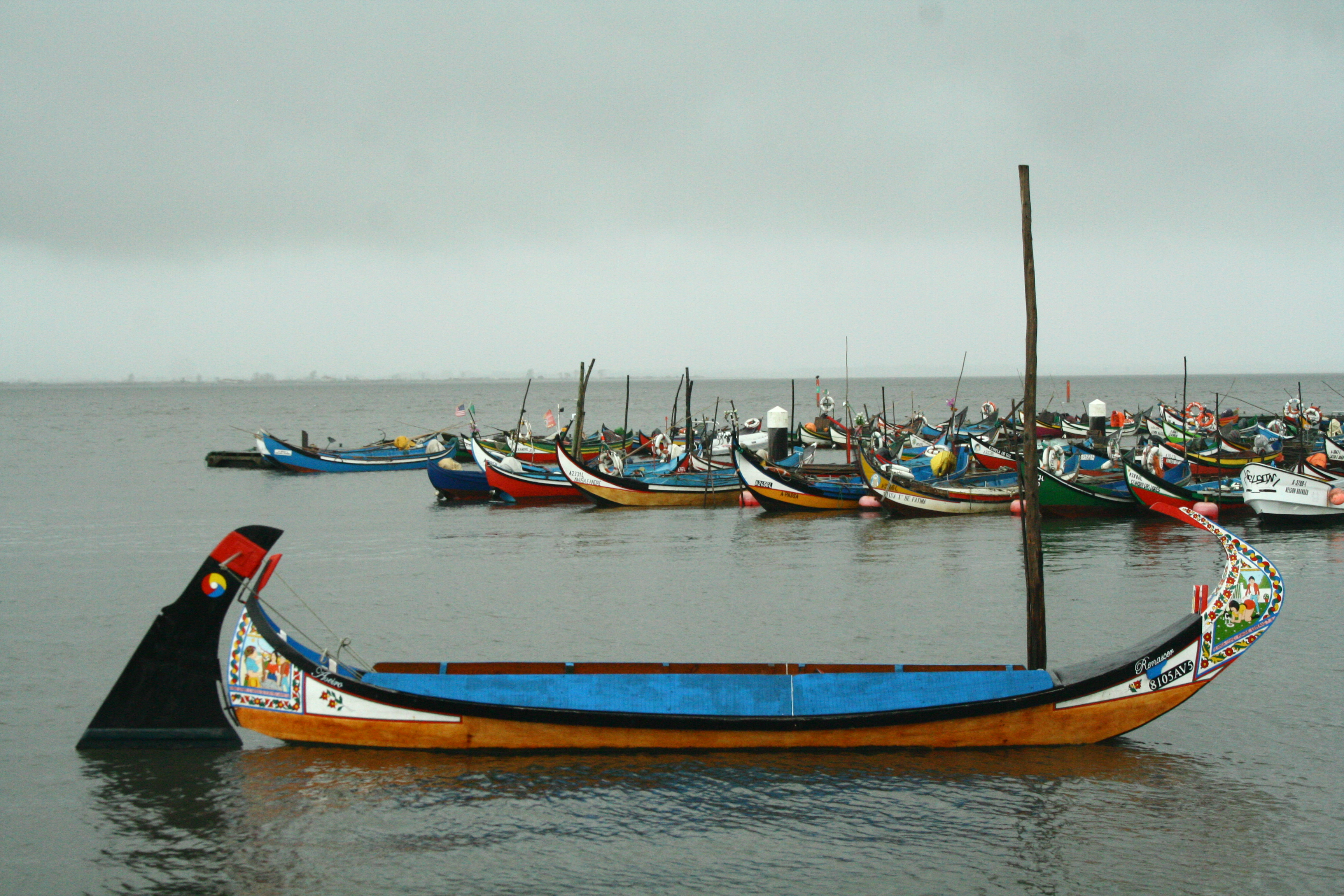 Barco moliceiro en la Ría de Aveiro, próximo a la Reserva Natural de las Dunas de Sao Jacinto (Portugal).